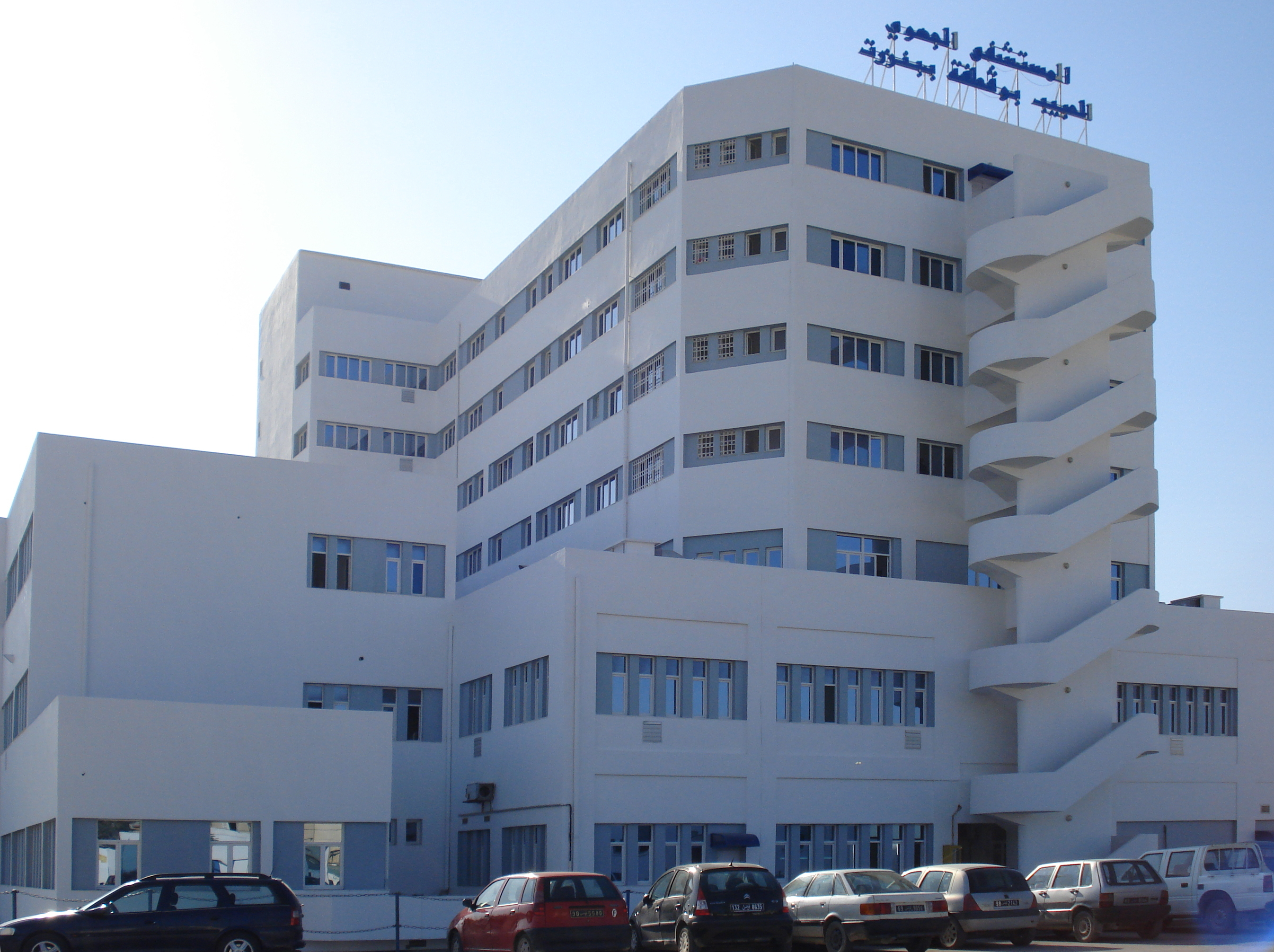 Hôpital Régional Habib Bougatfa de Bizerte, Tunisie